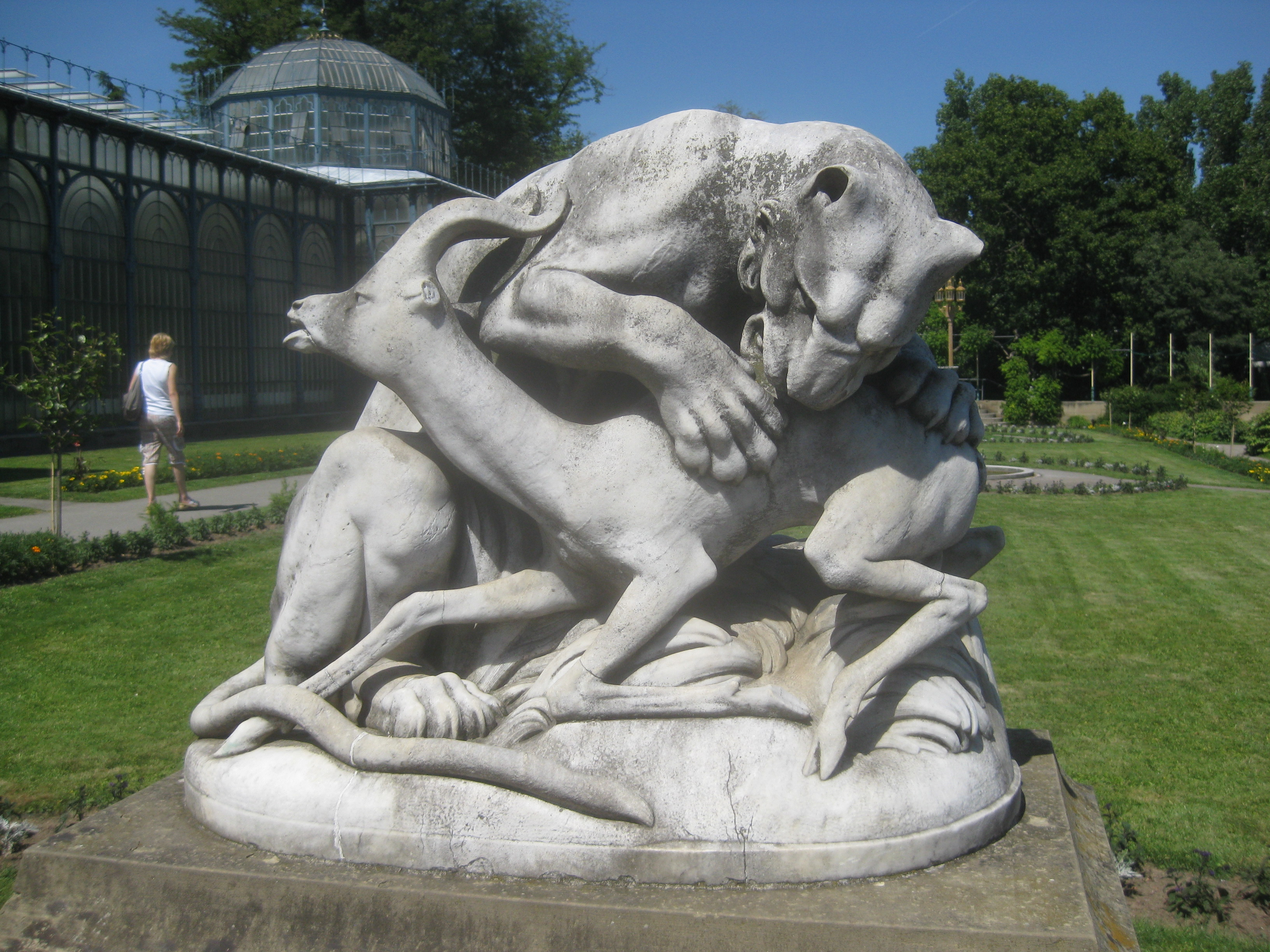 Albert Güldenstein: Panther, einer Gazelle auf den Rücken springend, Marmor, Entstehungsjahr 1848, bezeichnet: „A. Güldenstein. Rom. 1848.“, Stuttgart, Wilhelma, rechts vor dem Hauptportal des Maurischen Landhauses.